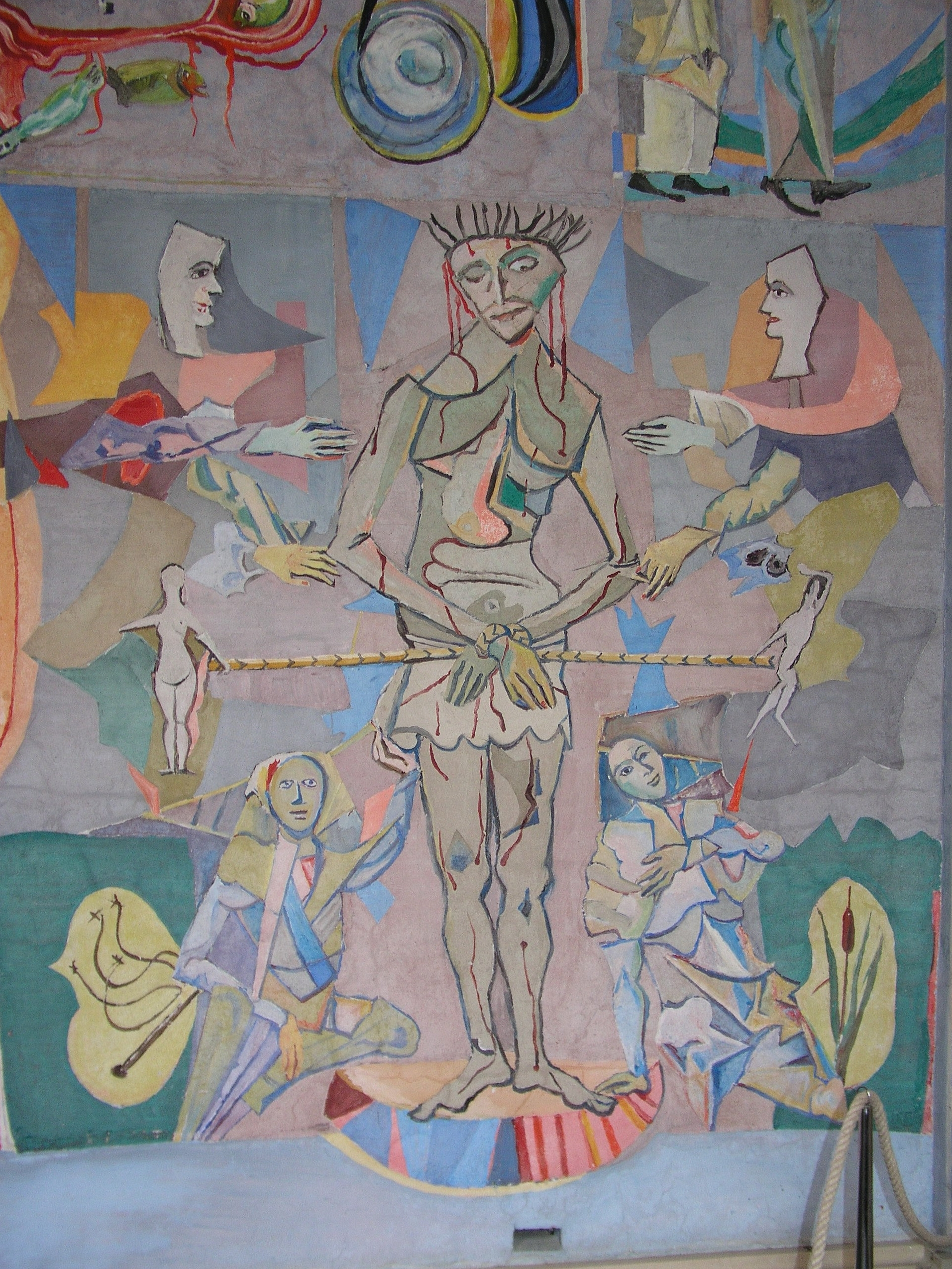 Basilika Seckau, Engelskapelle, Fresko "Seckauer Apokalypse" von Herbert Boeckl, 1952-1960, "Schmerzensmann"